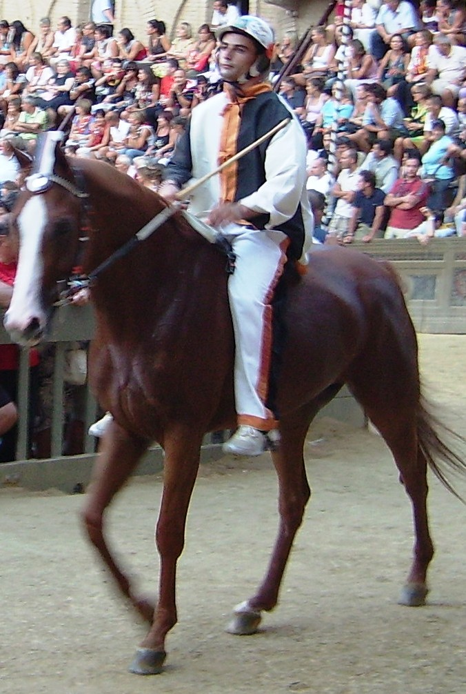 Il fantino Gianluca Fais detto Vittorio su Gammede